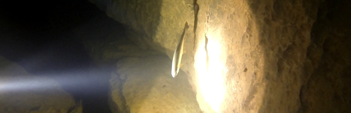 Truite - Grottes de Bèze - Siphon de la résurgence